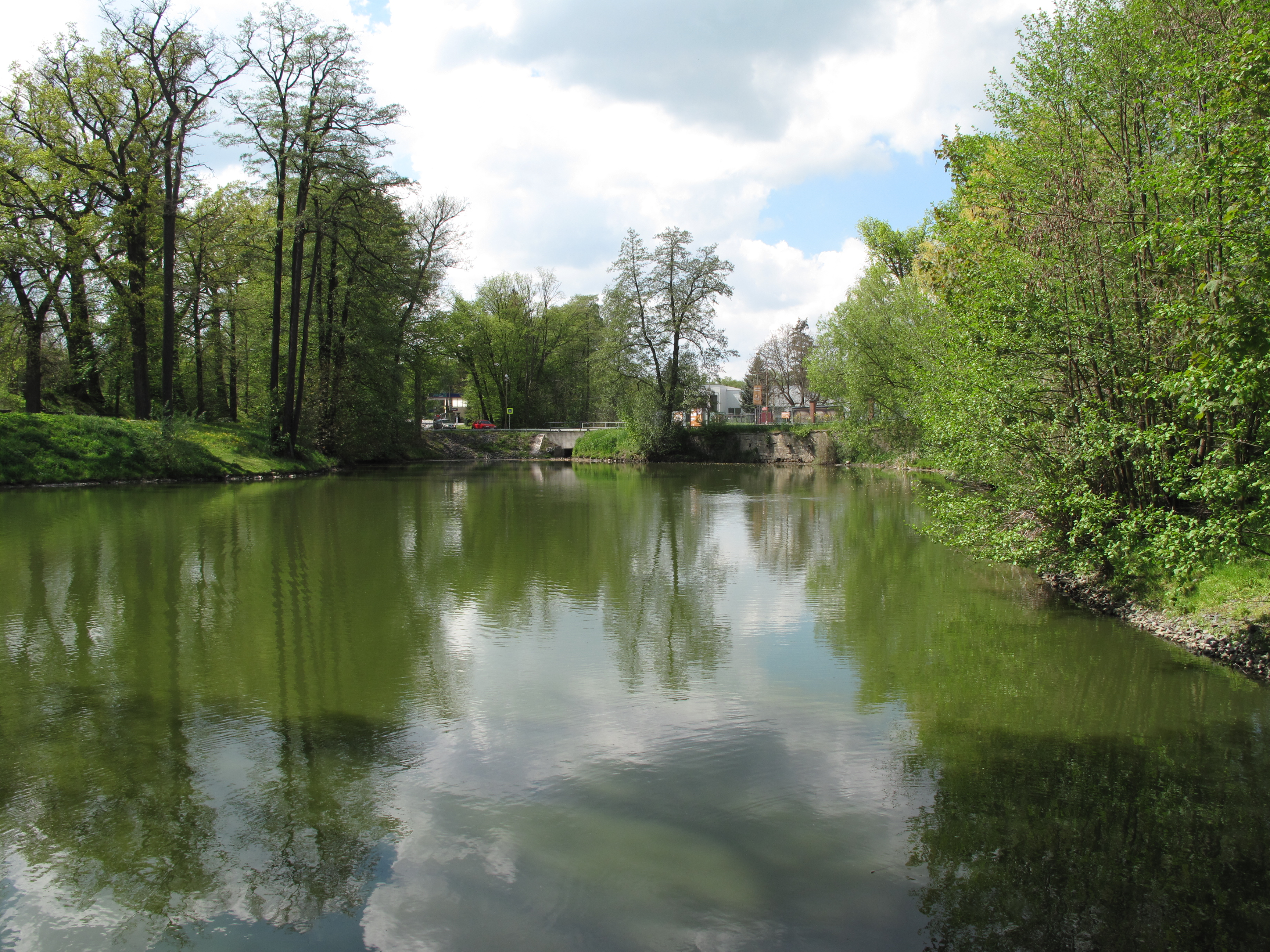 Klášterní rybník ve Velkých Popovicích. Okres Praha-východ, Česká republika.